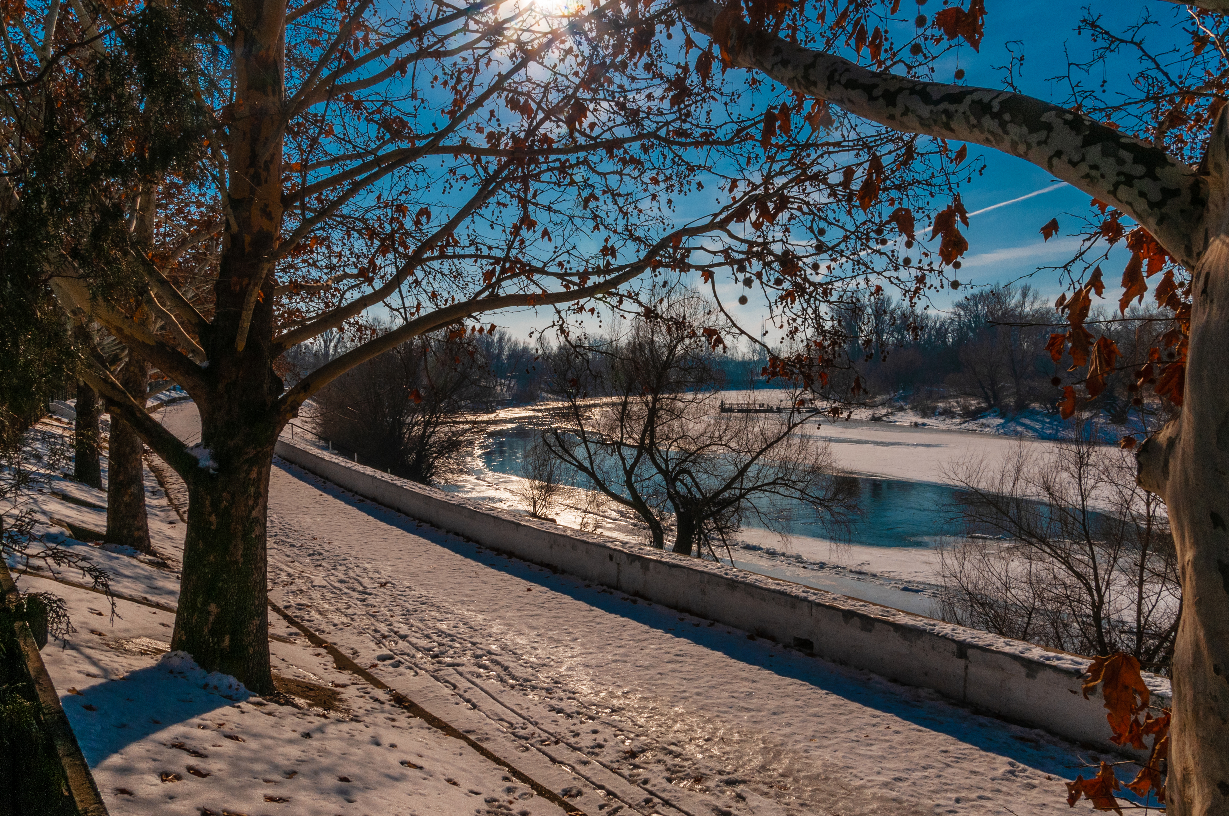 Tiraspol, Pridnestrowien, Grenzfluß Tyra nach Moldawien